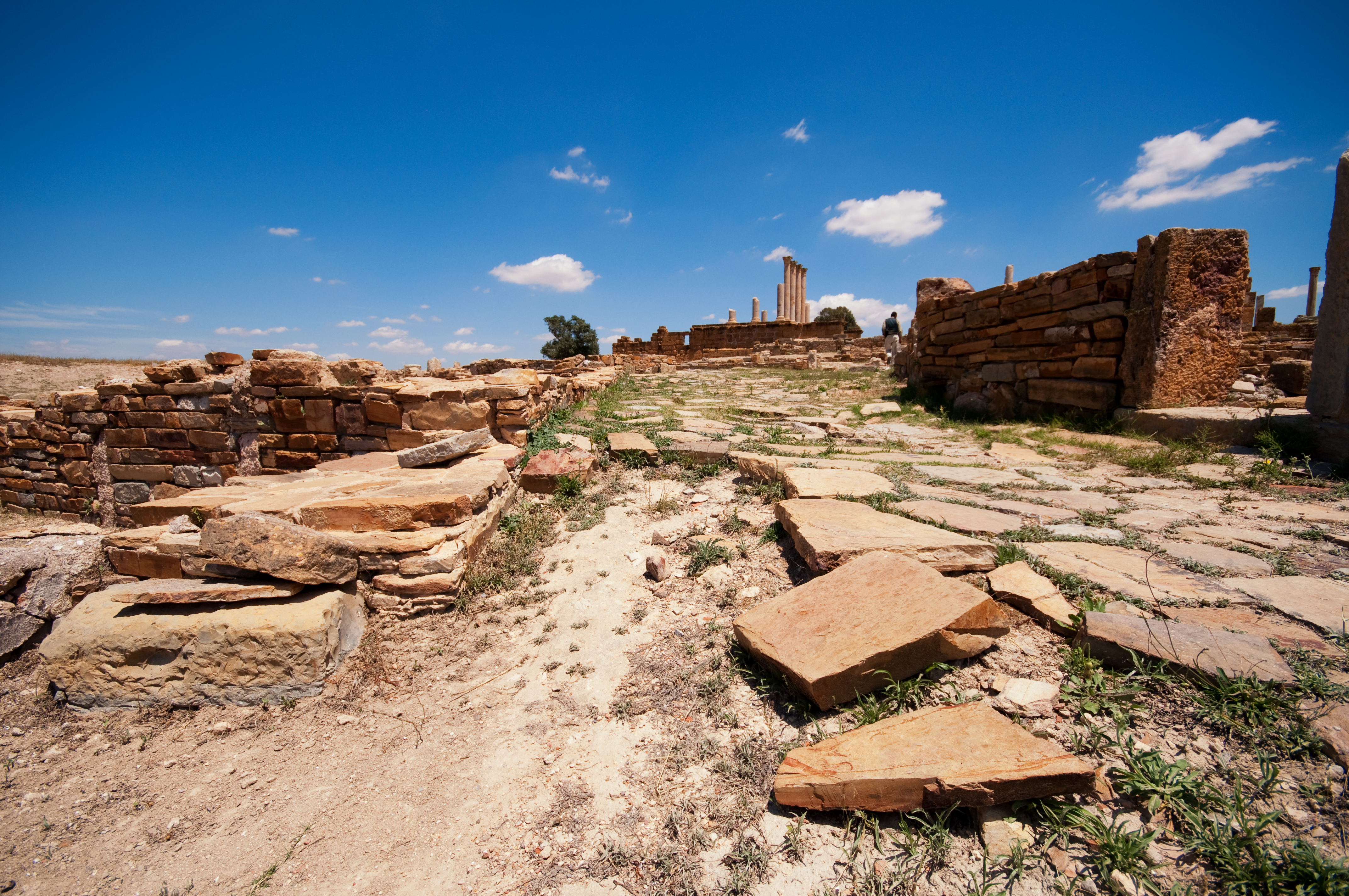 Vue vers le Capitole de Thuburbo Majus